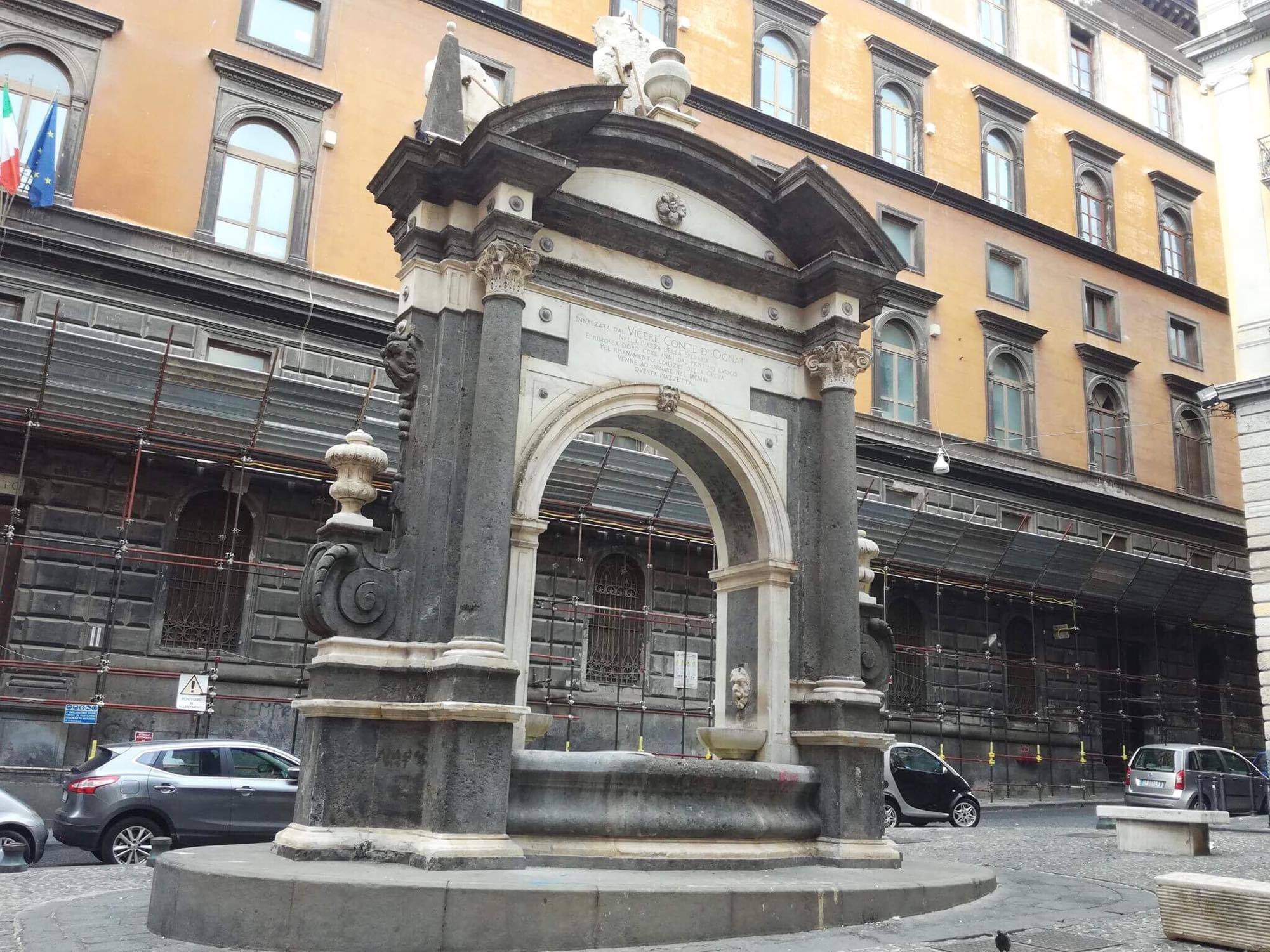 Fontana della Sellaria